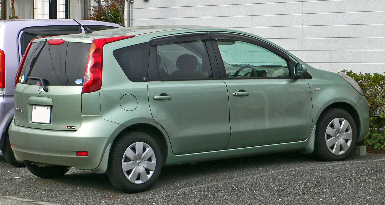 Nissan Note (2005 - )